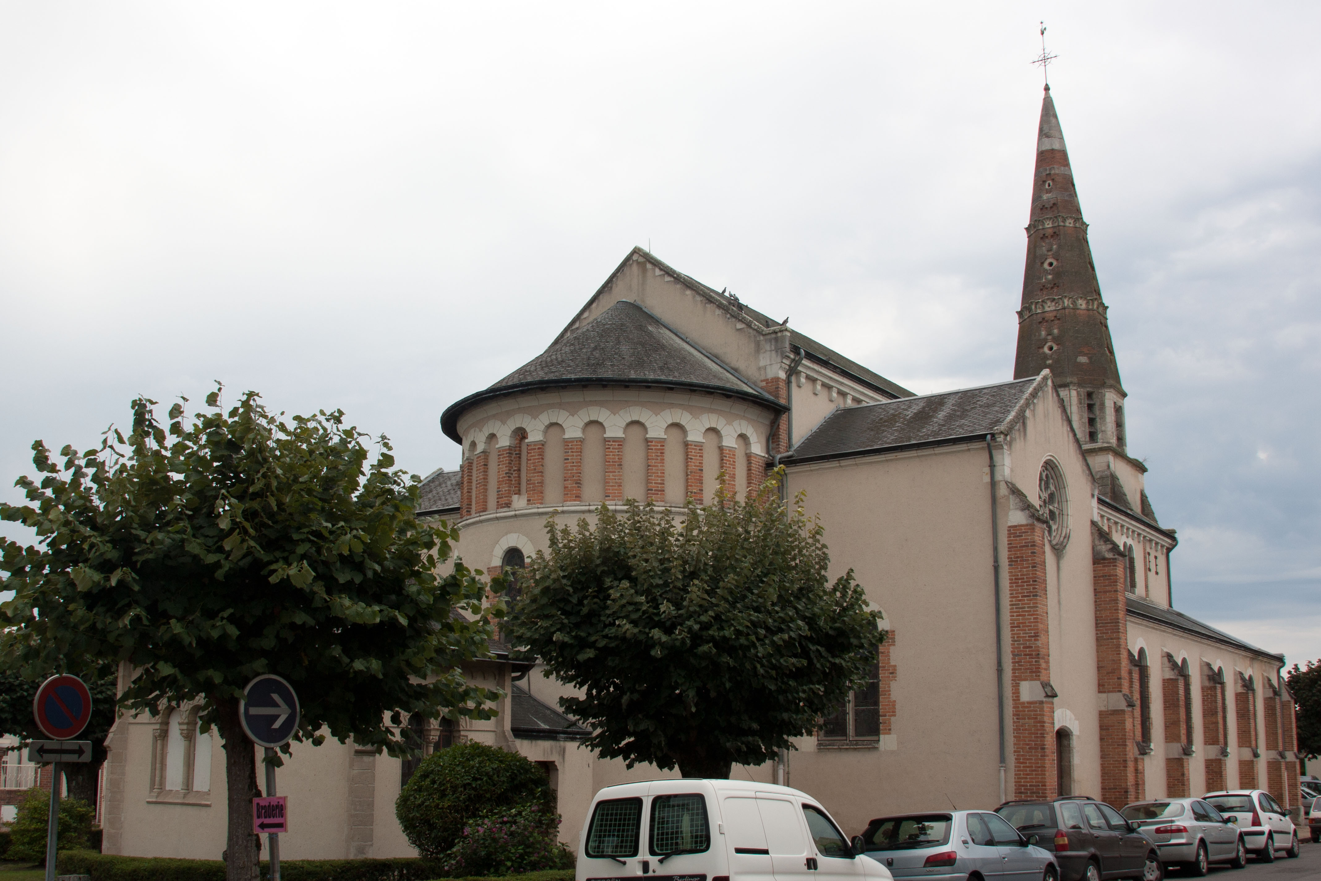 Église Sainte-Anne de Lamotte-Beuvron - Lamotte-Beuvron, Loir-et-Cher, France